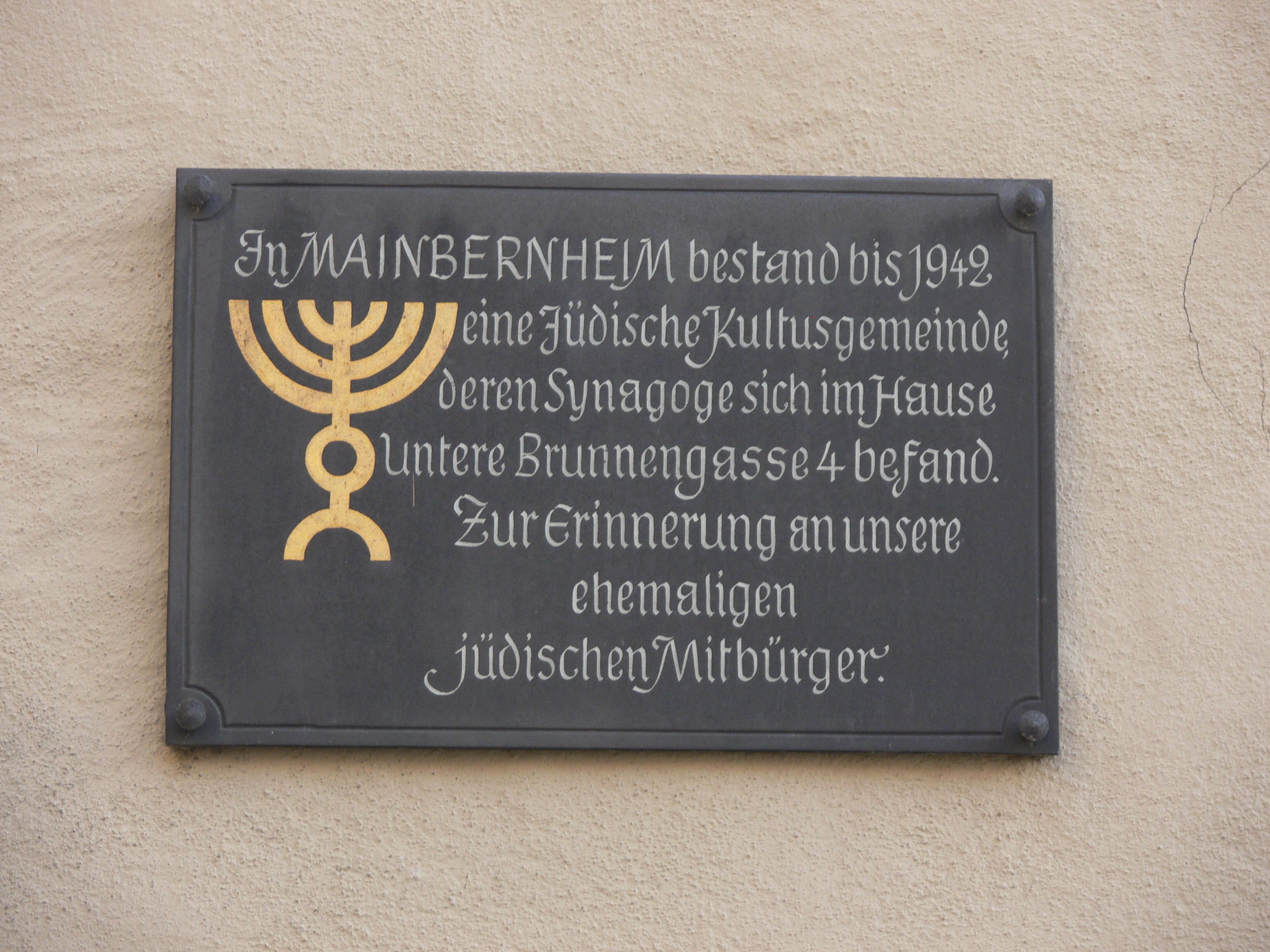 Gedenktafel für die jüdische Kultusgemeinde und Synagoge, Brunnengasse 4, Mainbernheim, Unterfranken, Bayern, Deutschland